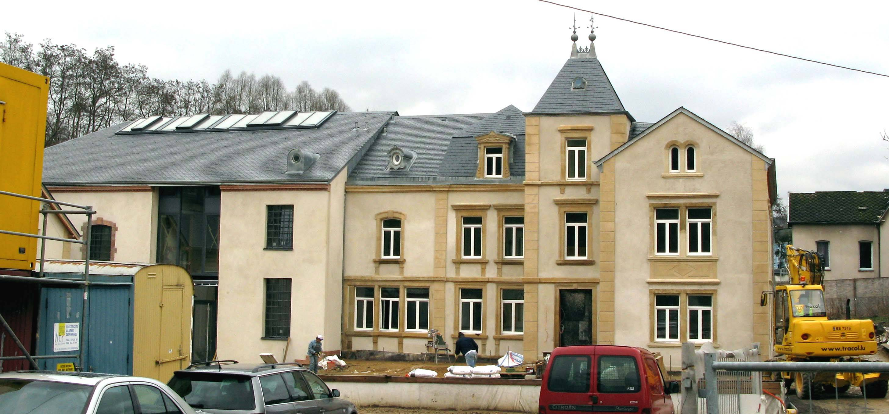 Géisserei Wies am Ëmbau (17.1.2007).